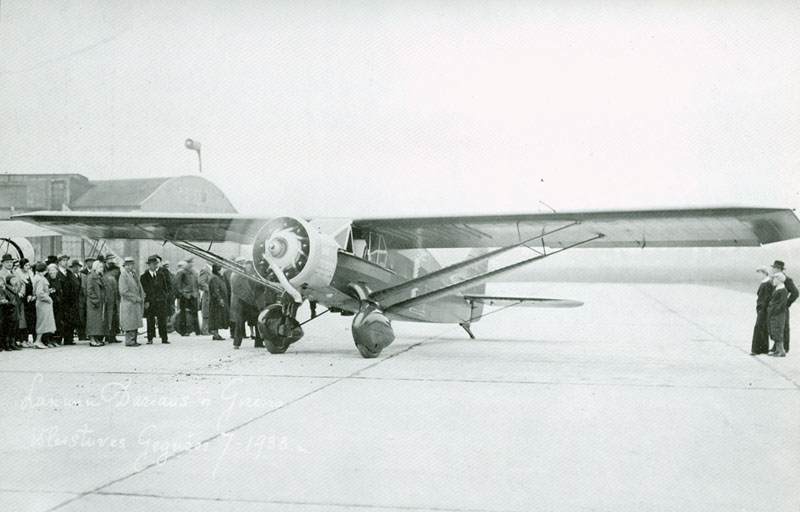 Литуаника и её пилоты перед полётом